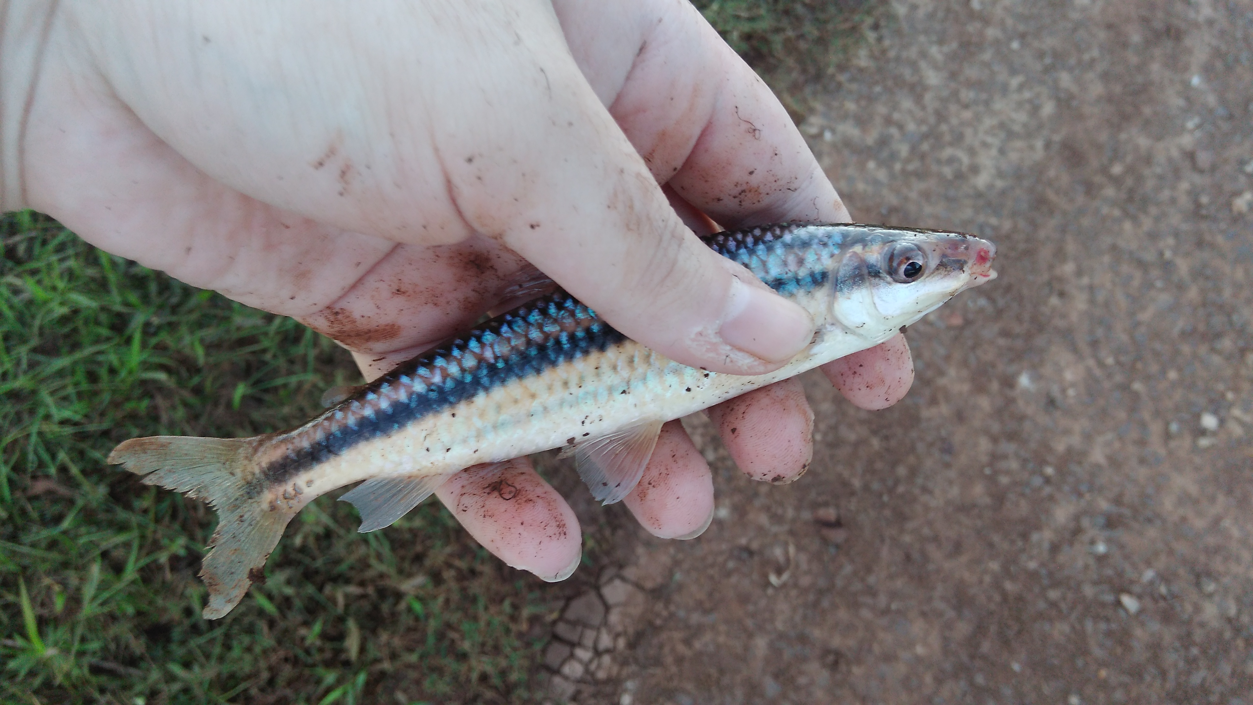 El pez en cuestión fue recolectado en la localidad de Yapeyú provincia de Corrientes Argentina en el río Uruguay medio.